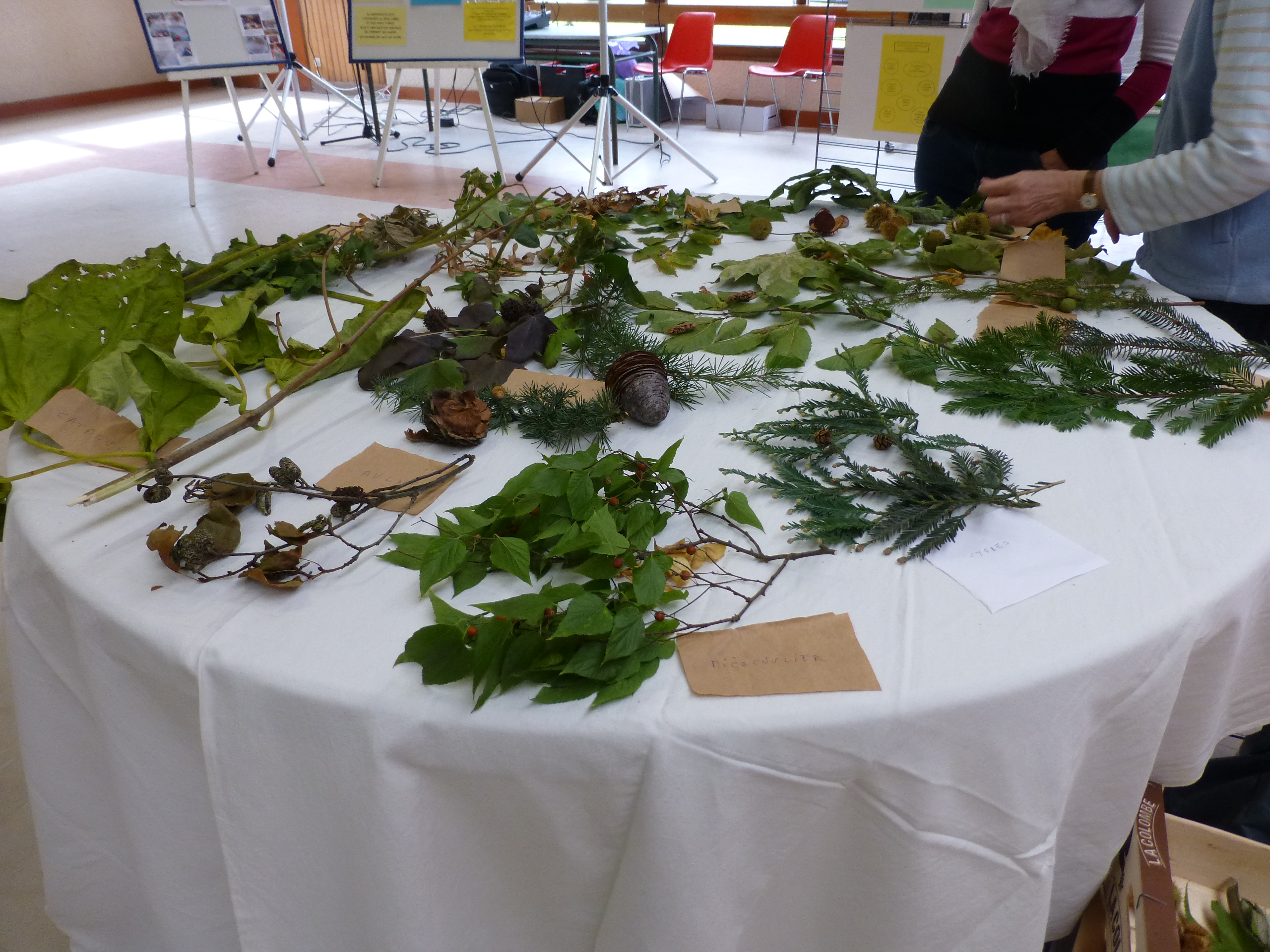 Malartic, RERS 2015, Reconnaissance botanique